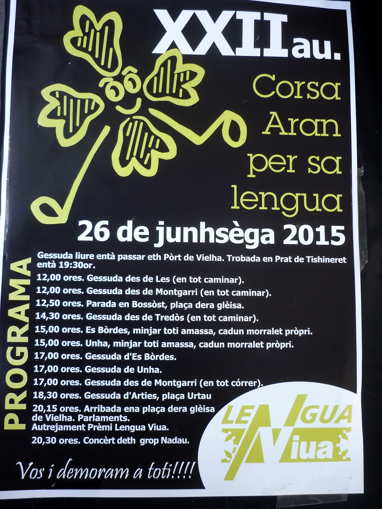 Programa de la XXII-ena Corsa Aran per sa lengua